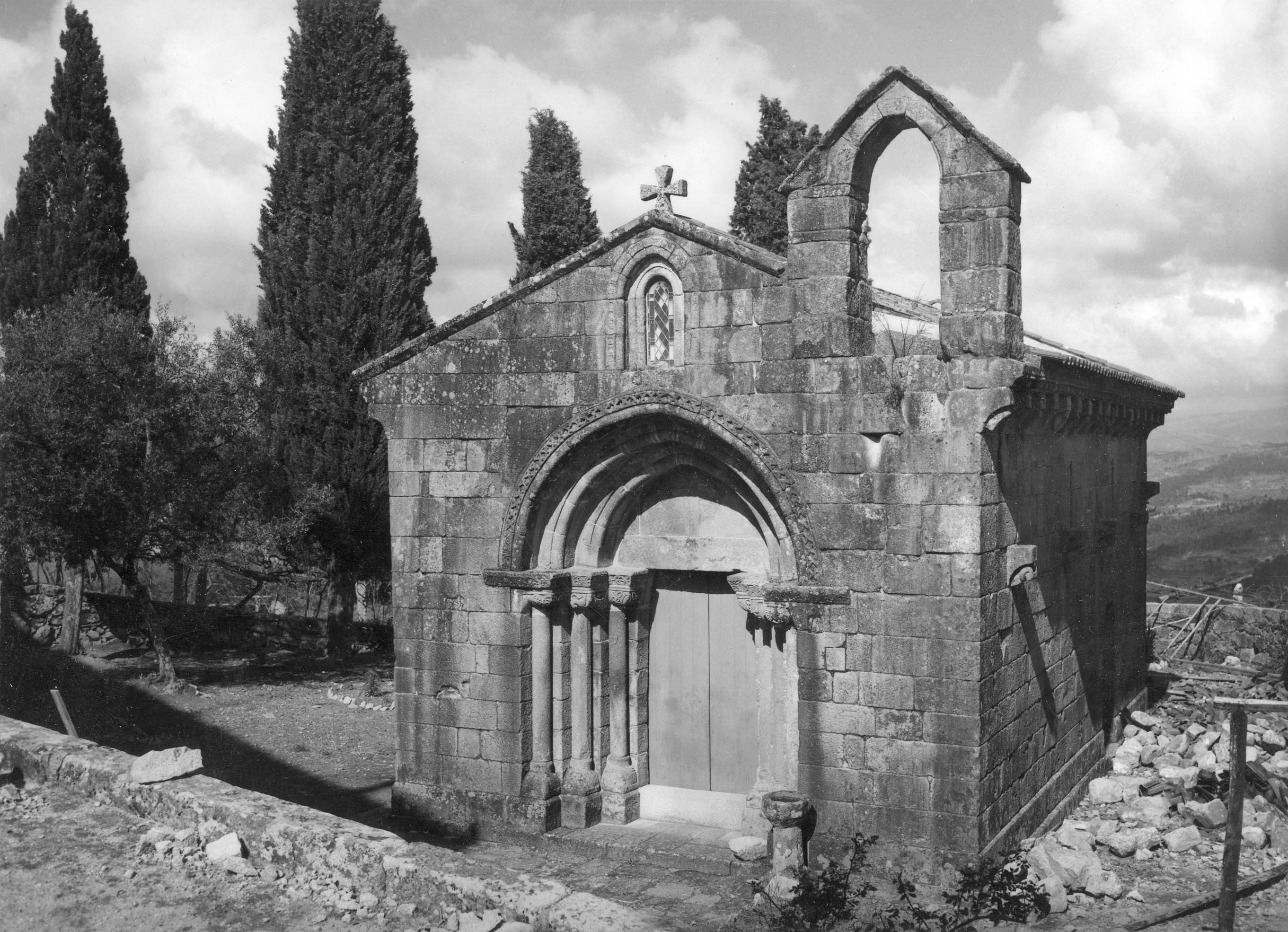 Fotógrafo: Mário Novais, 1899-1967. Orientador científico: Mário Tavares Chicó, 1905-1966. Data aproximada de produção da fotografia original: 1954. [CFT015.283.ic]